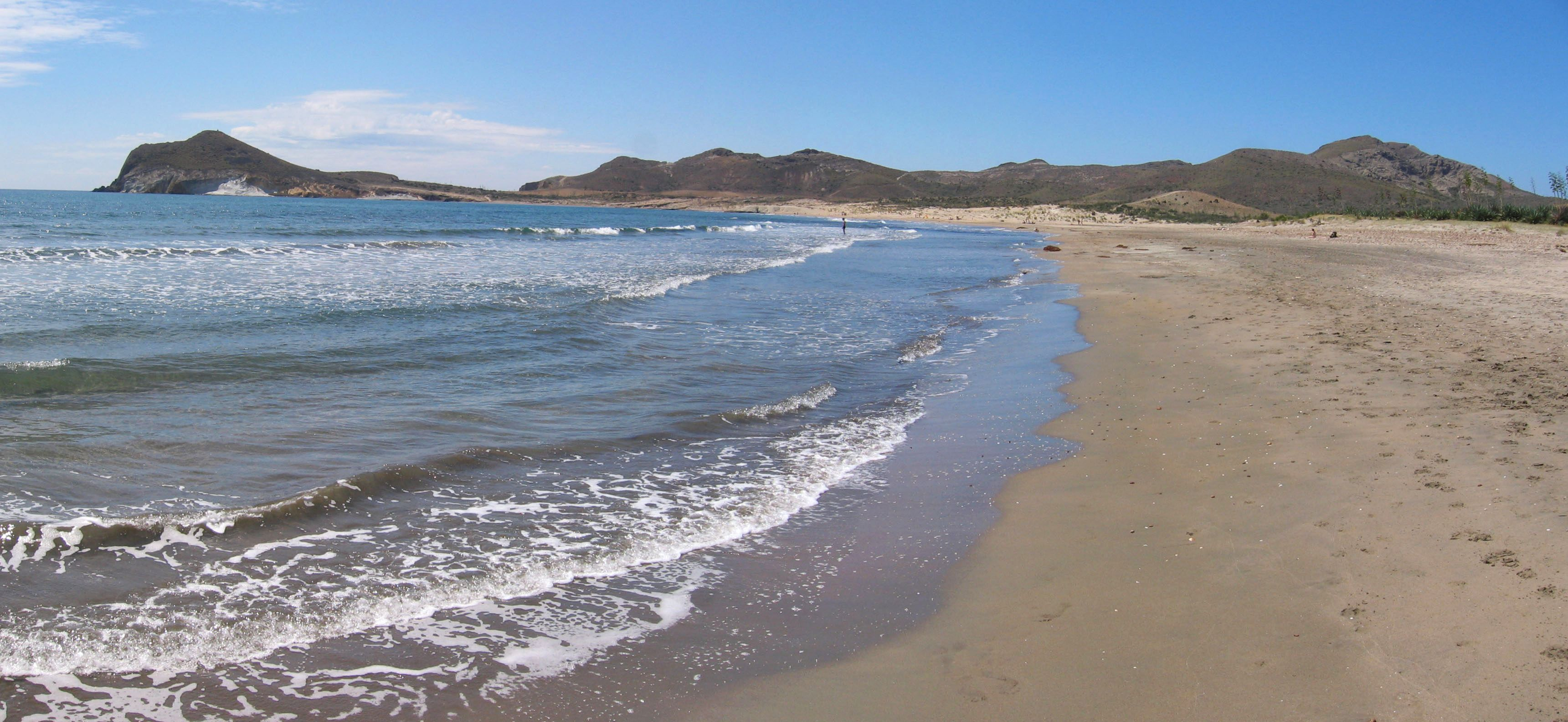 Panorámica - Playa de los Genoveses